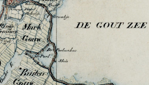 Detail van een topografische militaire kaart uit de periode 1830-1850